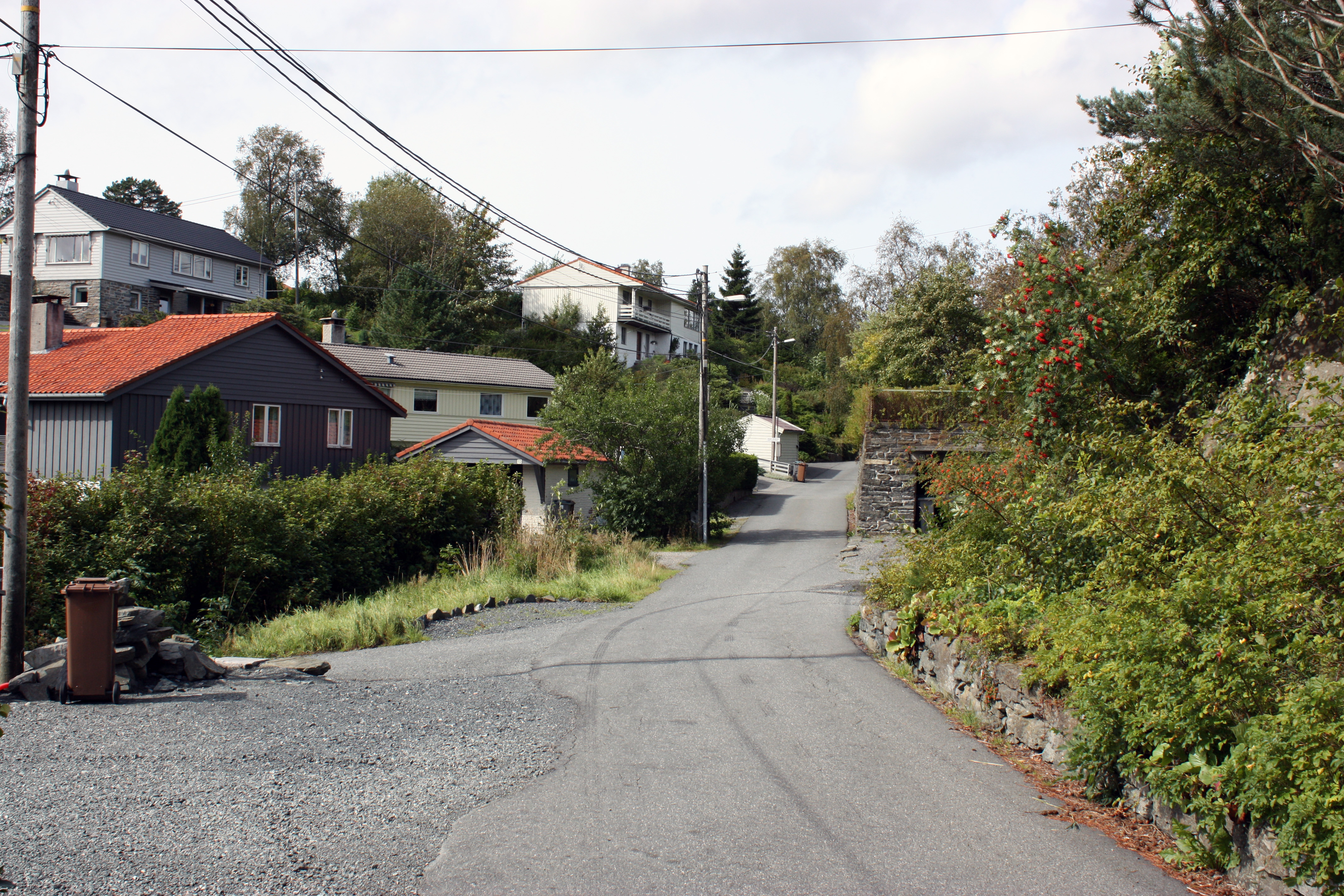 Skjoldberg, Fana, Bergen. August 2009.